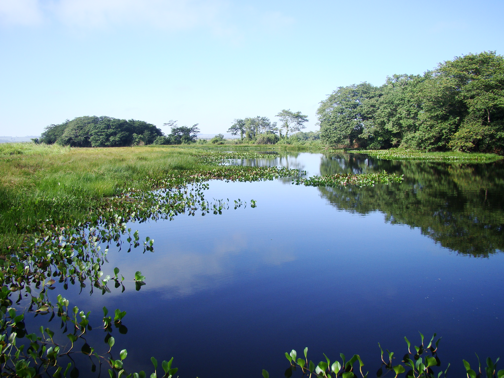 Lagoa Saraiva. Uma das mais importantes lagoas do Parque Nacional de Ilha Grande.